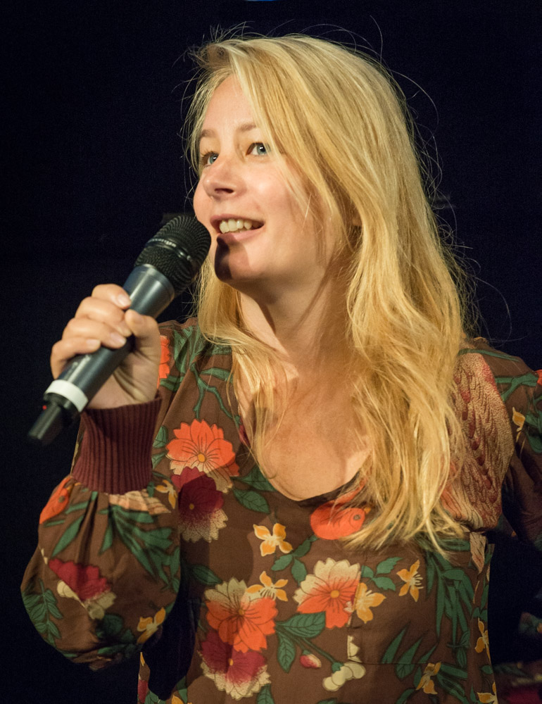 Beata Gårdeler under presentationen av den Svenska filmhösten i Filmhuset i Stockholm den 17 augusti 2015.